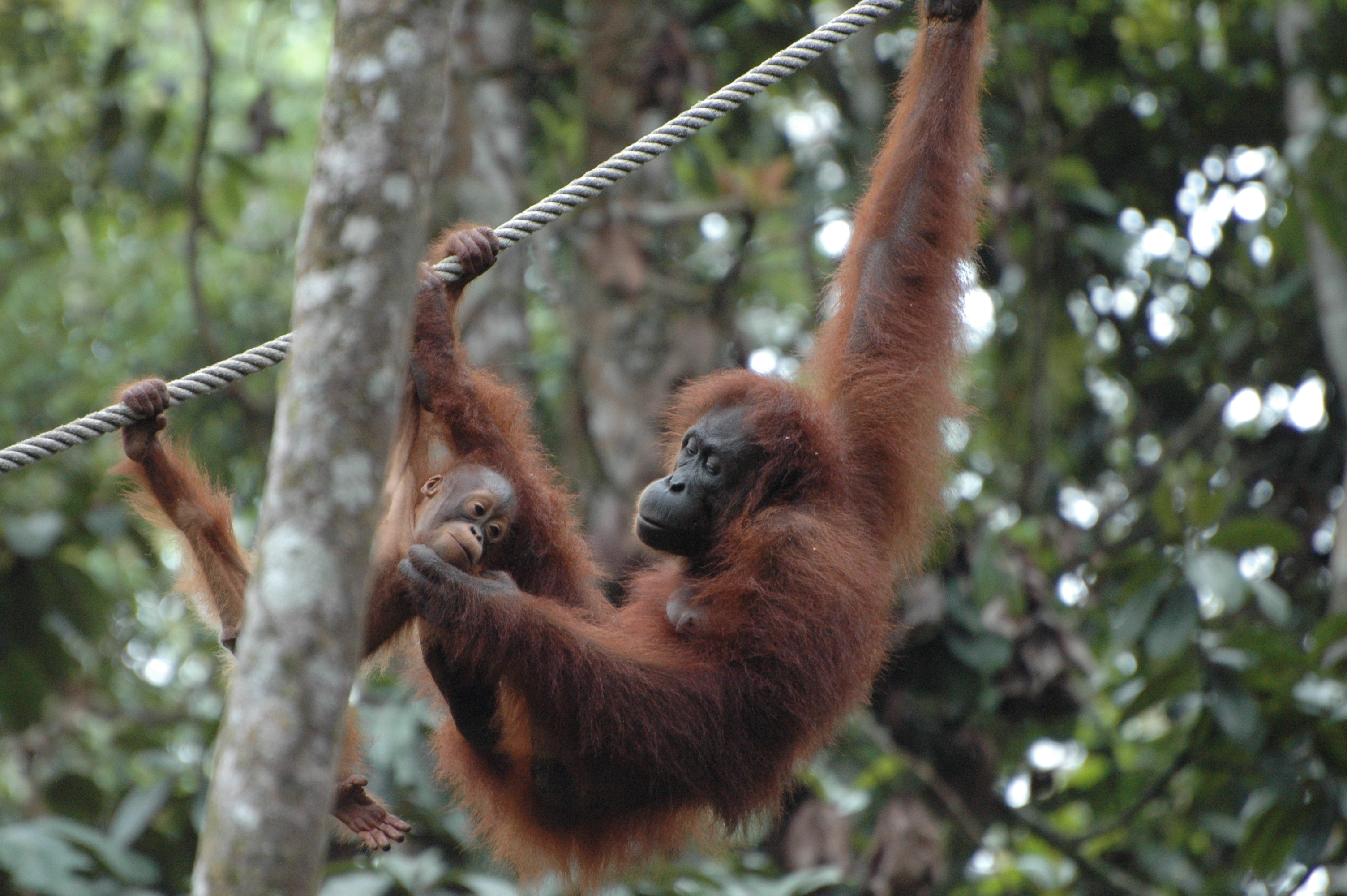 Bornean Orangutan (Pongo_pygmaeus)